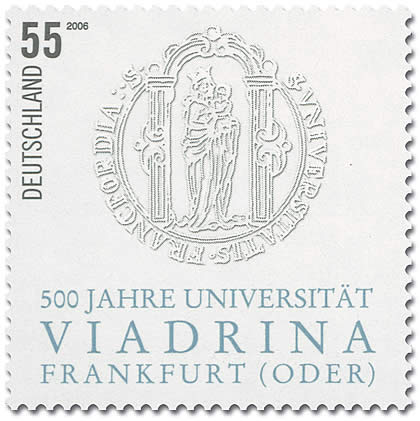 500 Jahre Universität Frankfurt (Oder): "Siegel der Universität Viadrina Frankfurt (Oder)", Europa-Universität Viadrina Frankfurt (Oder)